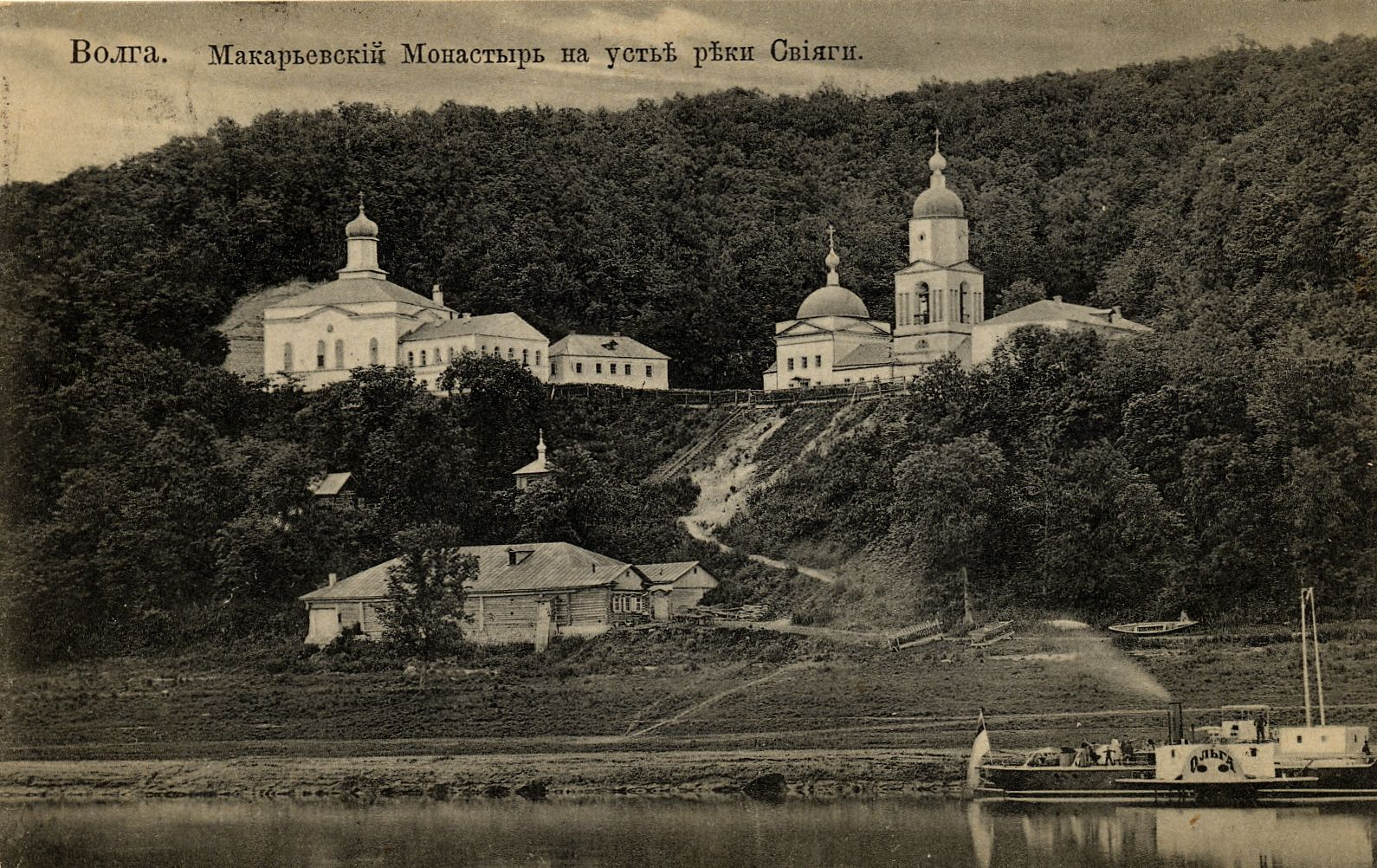 Татарстан, Макарьевский монастырь